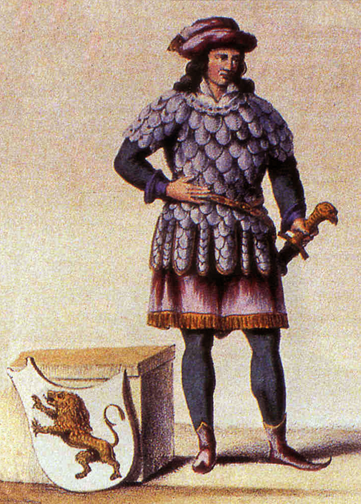 Charles de France, fondateur de Bruxelles, d'après une lithographie romantique vers 1850.